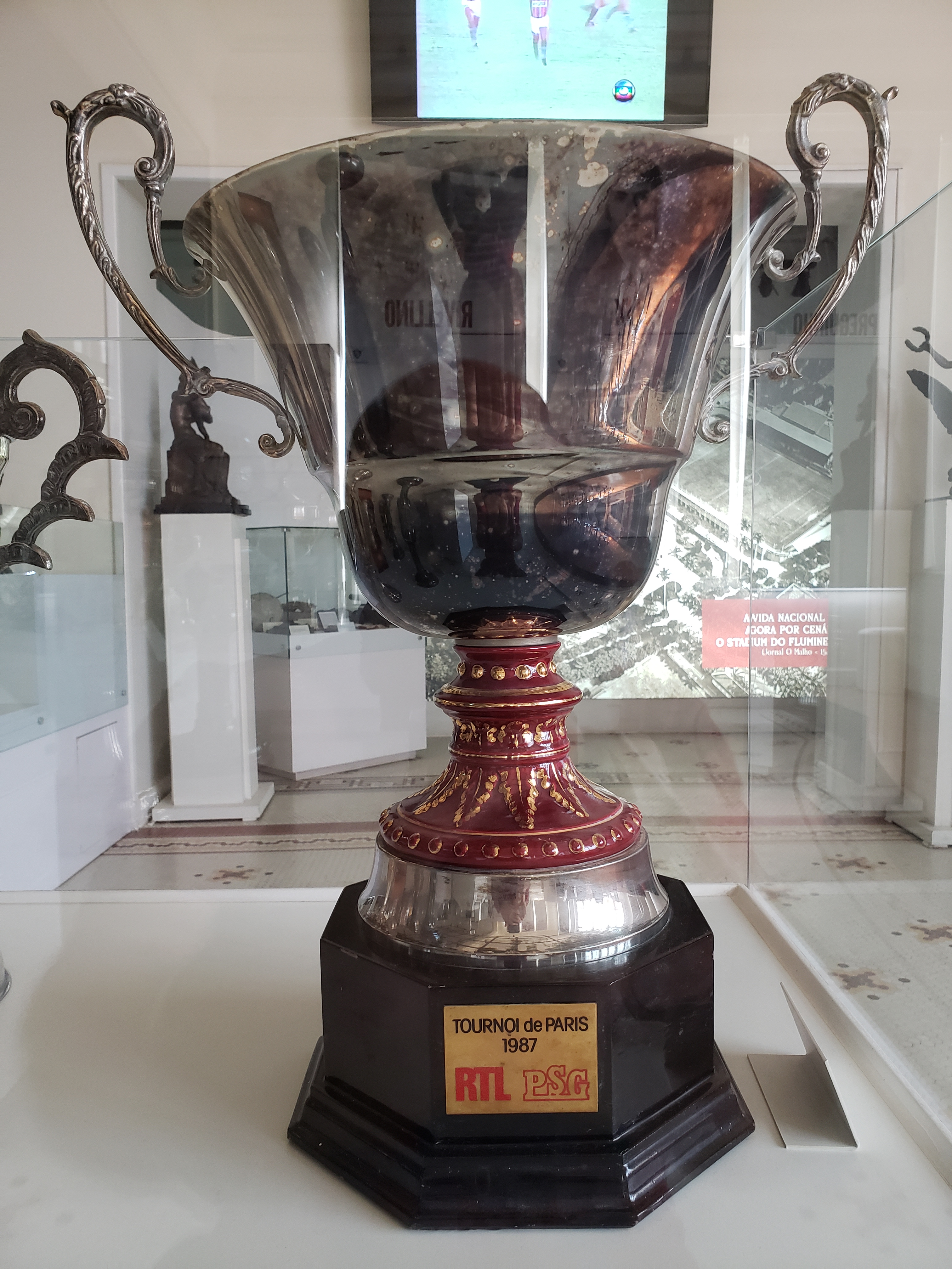 Torneio de Paris de 1987, conquistado pelo Fluminense Football Club.